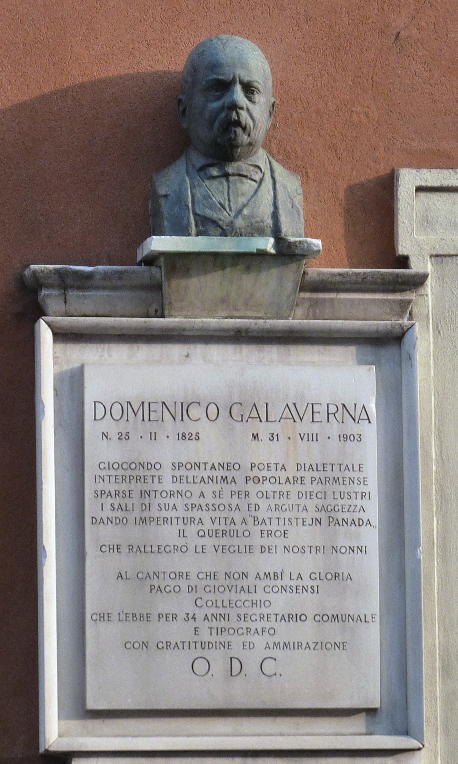 Targa al poeta e tipografo Domenico Galaverna a Collecchio (Parma).